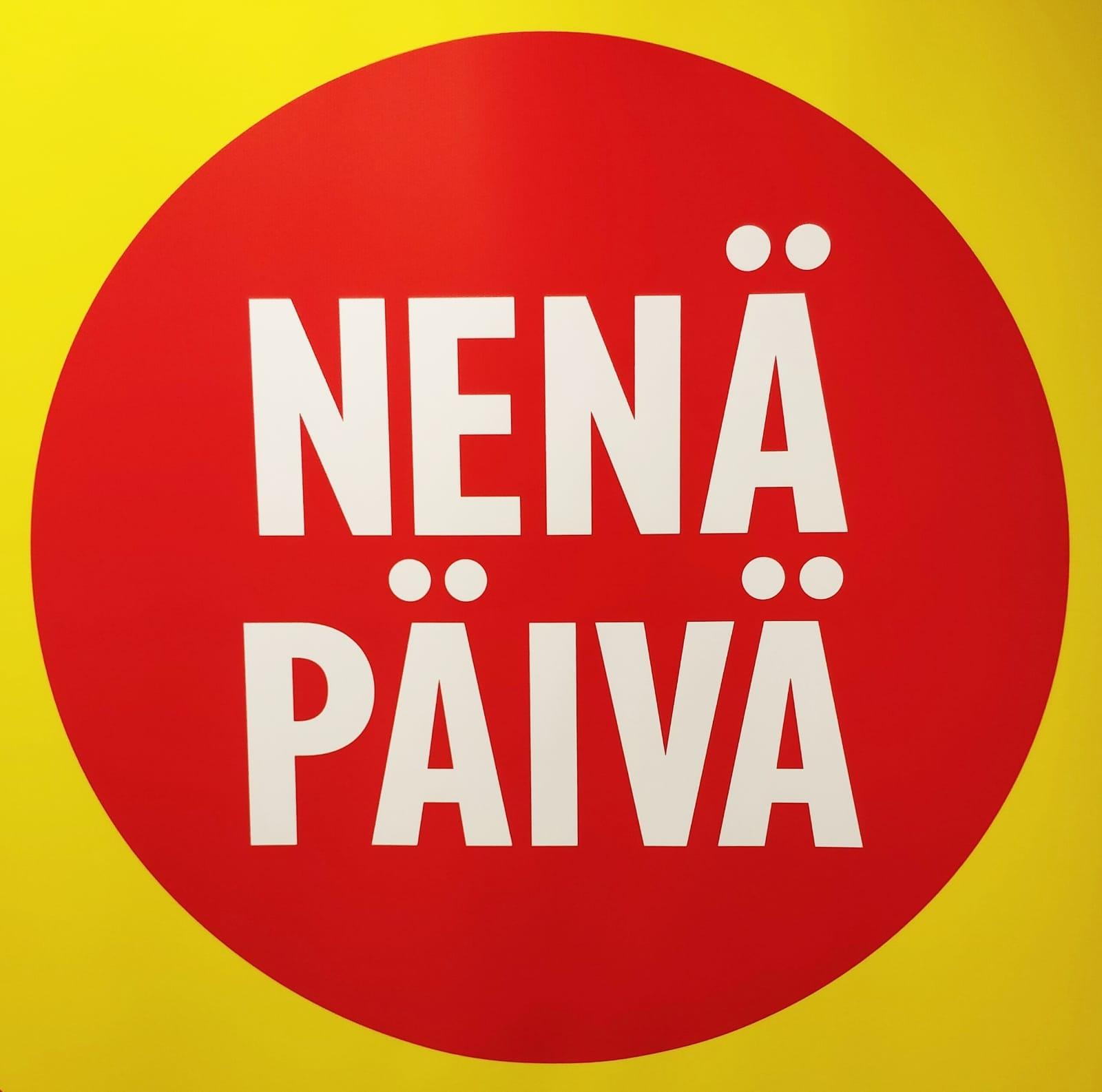 Nenäpäivän uusi logo (2019)